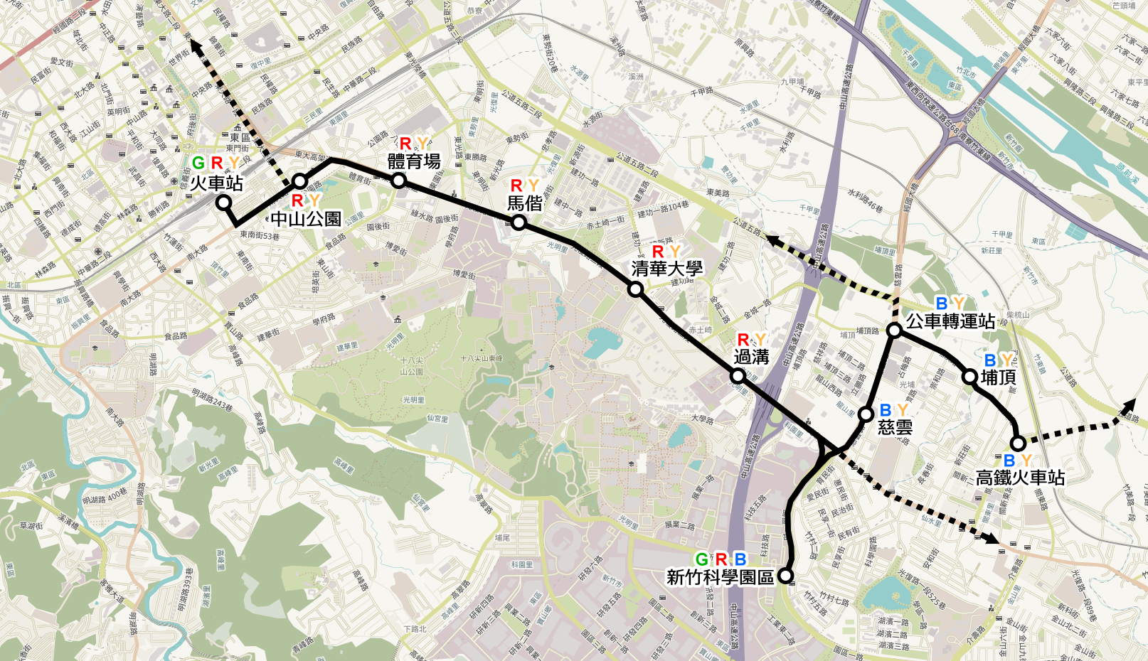 中文（台灣）: 2015年大新竹GRT系統路網圖